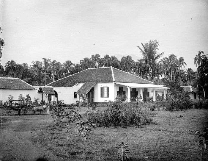 Negatief. Assistent-Residentshuis, Bondowoso